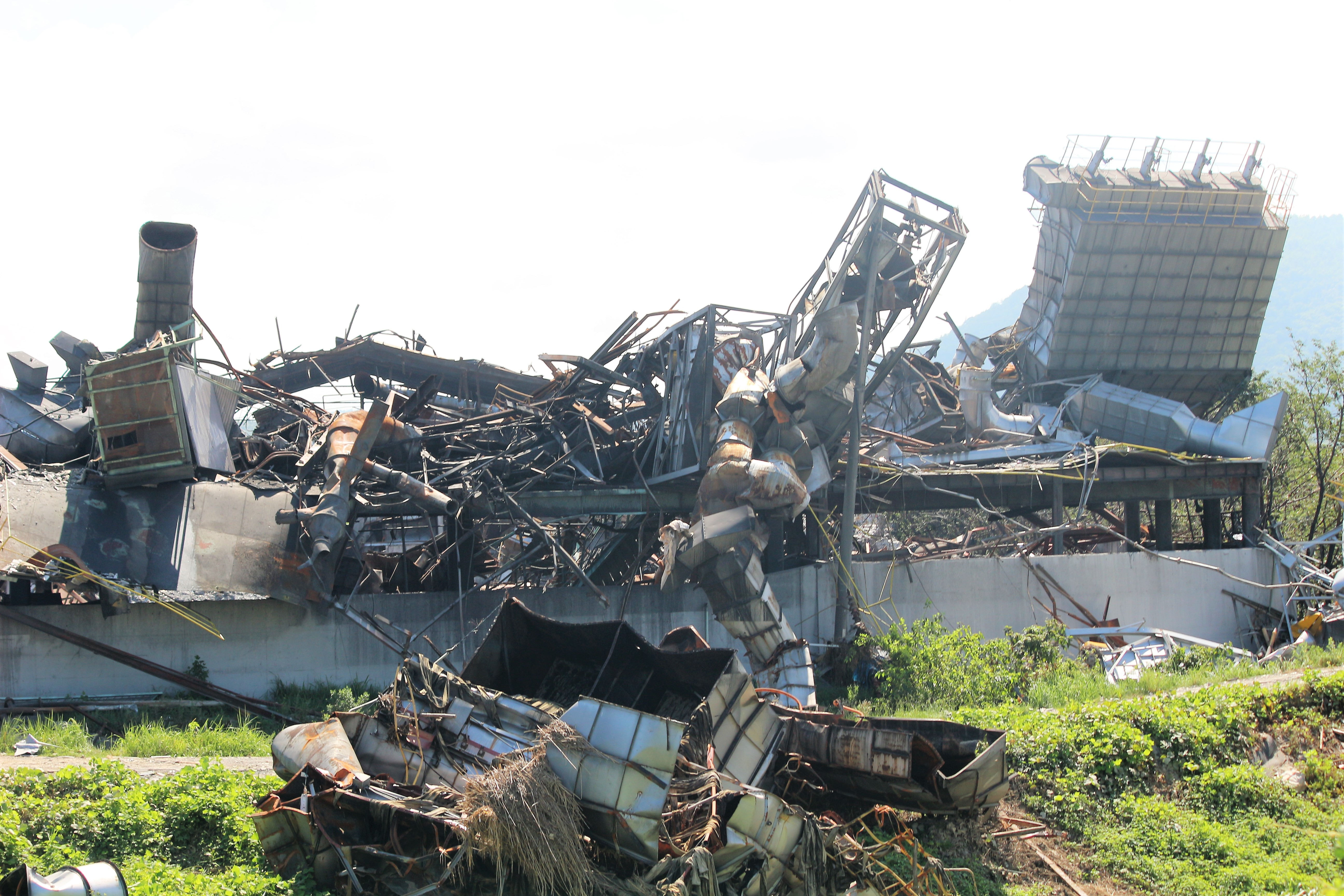 岡山県総社市下原で2018年7月に起きた朝日アルミ産業の爆発事故で破壊された朝日アルミ産業のアルミ溶解炉など。